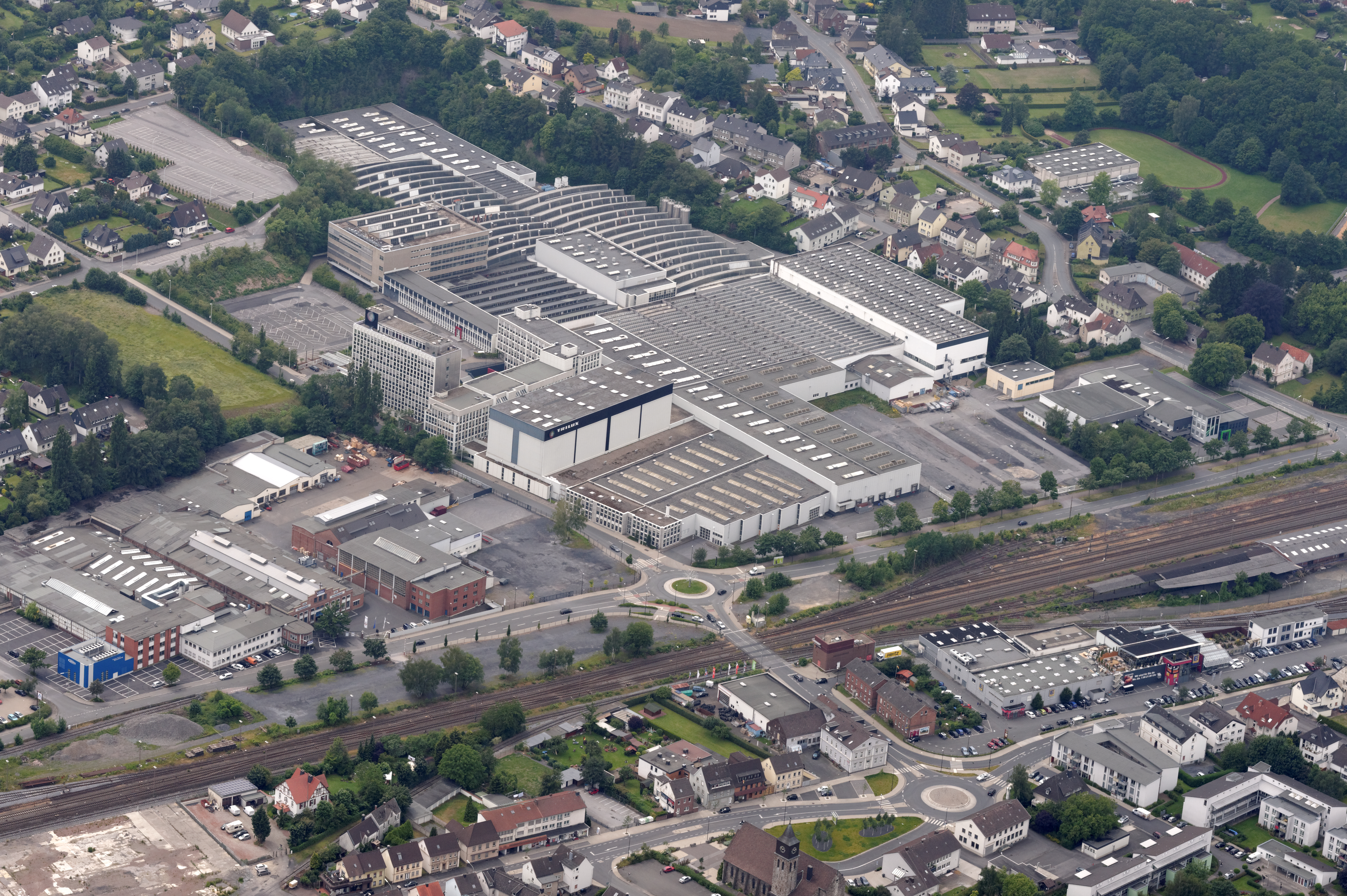 Fotoflug Sauerland Nord. Arnsberg, Teil von Neheim mit Trilux (große Fabrik) und Desch (kleinere Fabrik). The making of this document was supported by the Community-Budget of Wikimedia Germany.